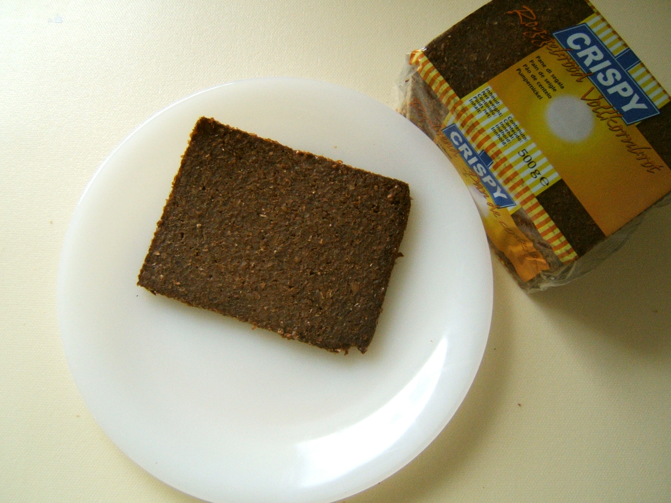 Roggebrood